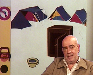 Portrait de Hervé Télémaque